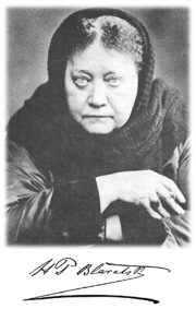 Helena Petrovna Blavatsky (1831-1891), im Jahr 1889